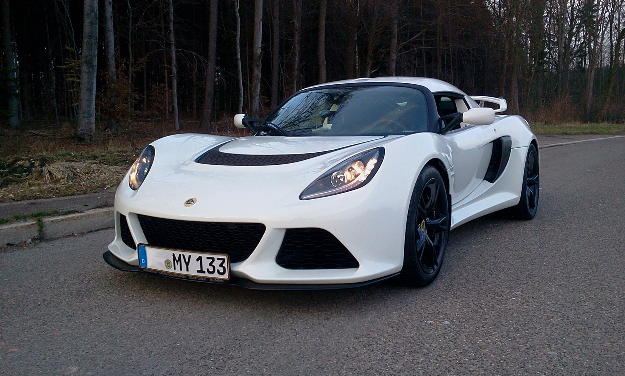 Lotus Exige S V6 Modelljahr 2012 von vorne